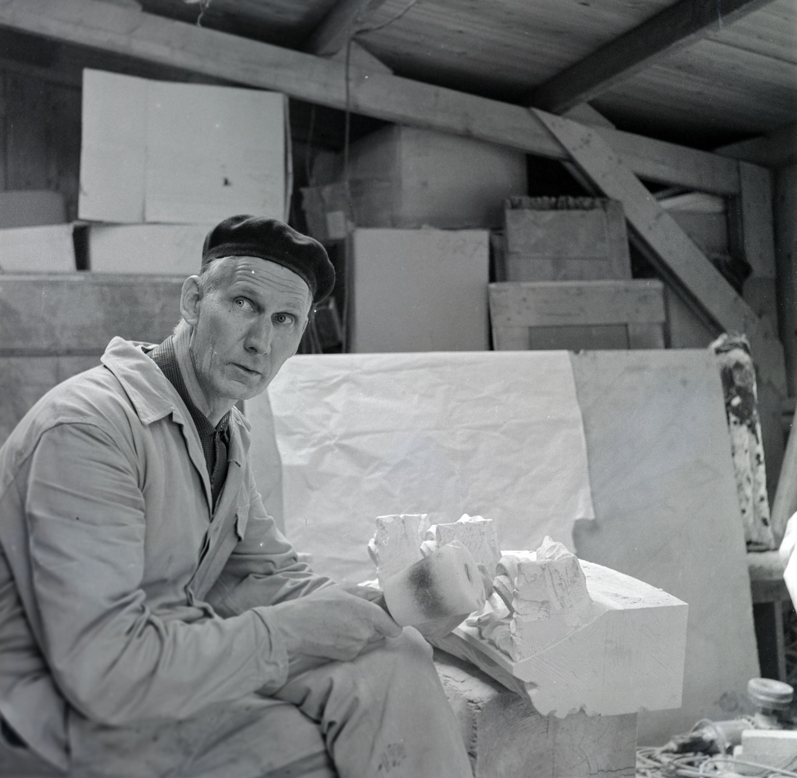 Henk Vreeling aan het werk voor de beelden van de Eusebiuskerk